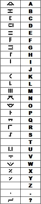 Geheimschriftschlüssel für Artemis Fowl Band 2